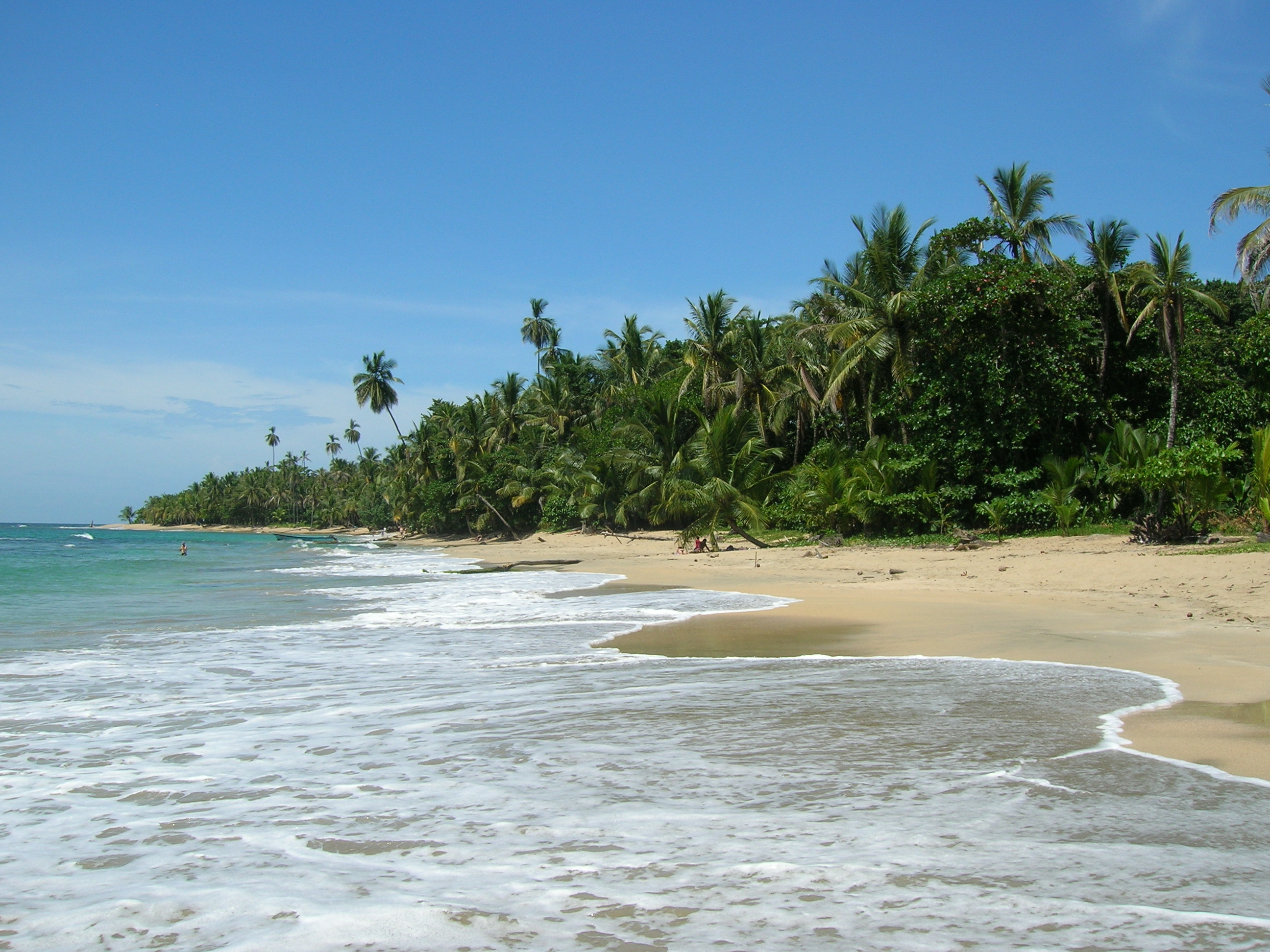 Playa Uva, un lugar de paz y relax cercano a Puerto Viejo